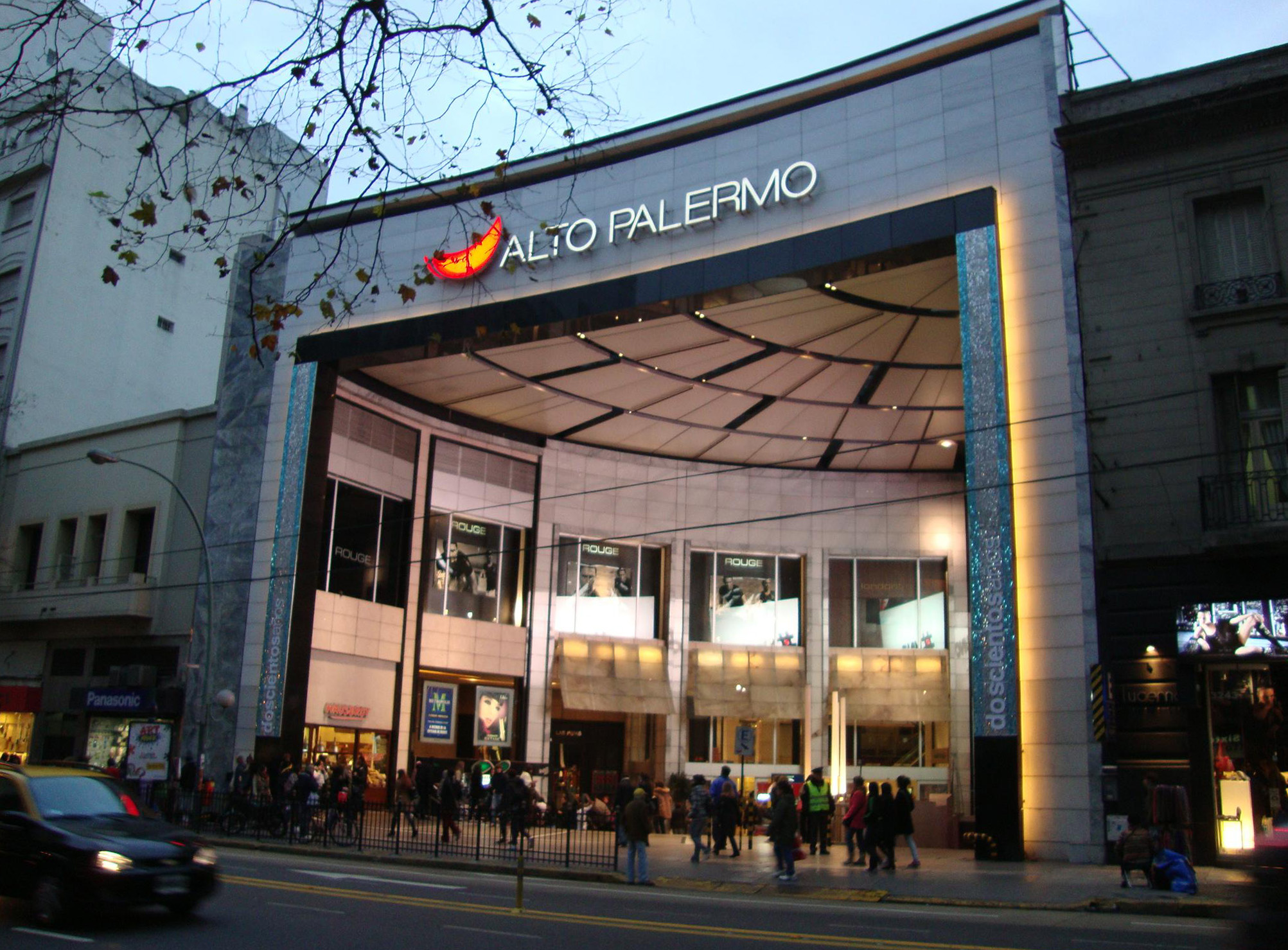 Vista del acceso al centro comercial Alto Palermo, Avenida Santa Fe y Coronel Díaz. La foto muestra la entrada sobre la Avenida Santa Fe. Buenos Aires, Argentina.